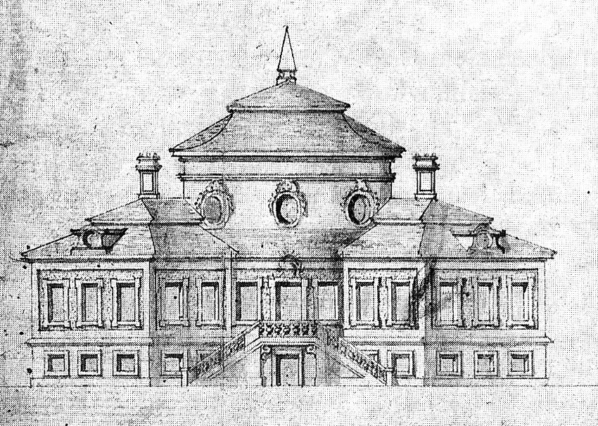 Původní podoba zámku